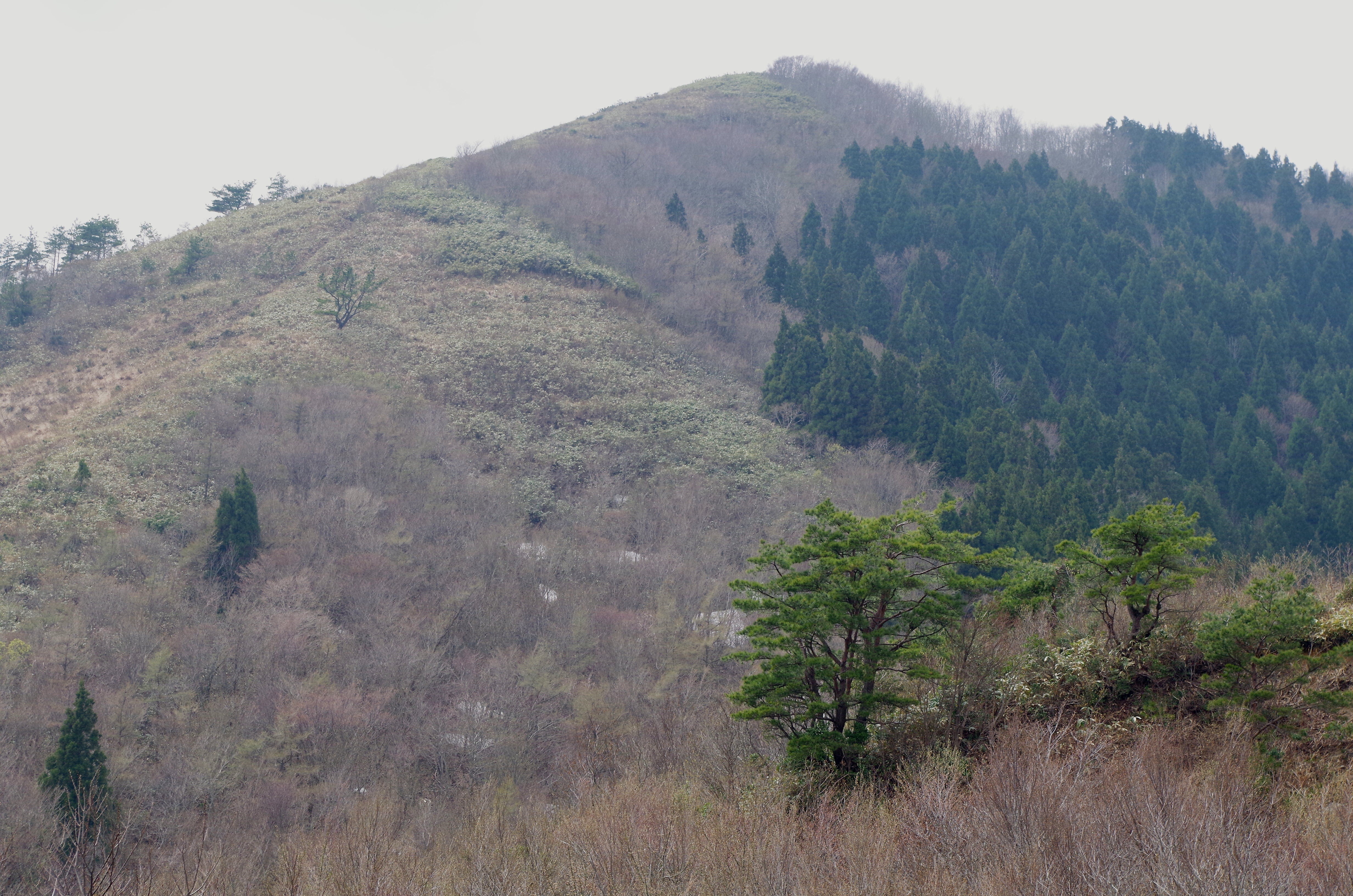 人形仙 母子地蔵（岡山県苫田郡鏡野町）から見た景色